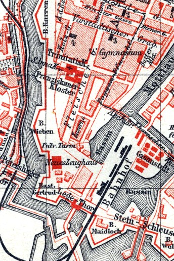 Stare Przedmieście w Gdańsku na planie z 1885 r.